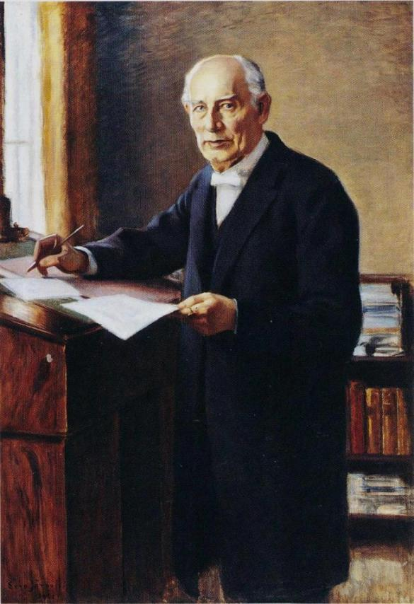 Kansallis-Osake-Pankin tilaama postuumi muotokuva perustajiinsa kuuluneesta Alfred Kihlmanista (1825–1904). Kyseessä on toisinto Järnefeltin vuonna 1893 maalaamasta Kihlmanin muotokuvasta.